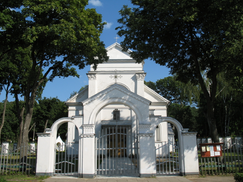 Aukštosios Panemunės Švč. Mergelės Marijos Vardo bažnyčia, Kaunas.